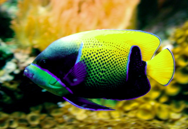 Traumkaiserfisch (Pomacanthus navarchus) (Cuvier, 1831)